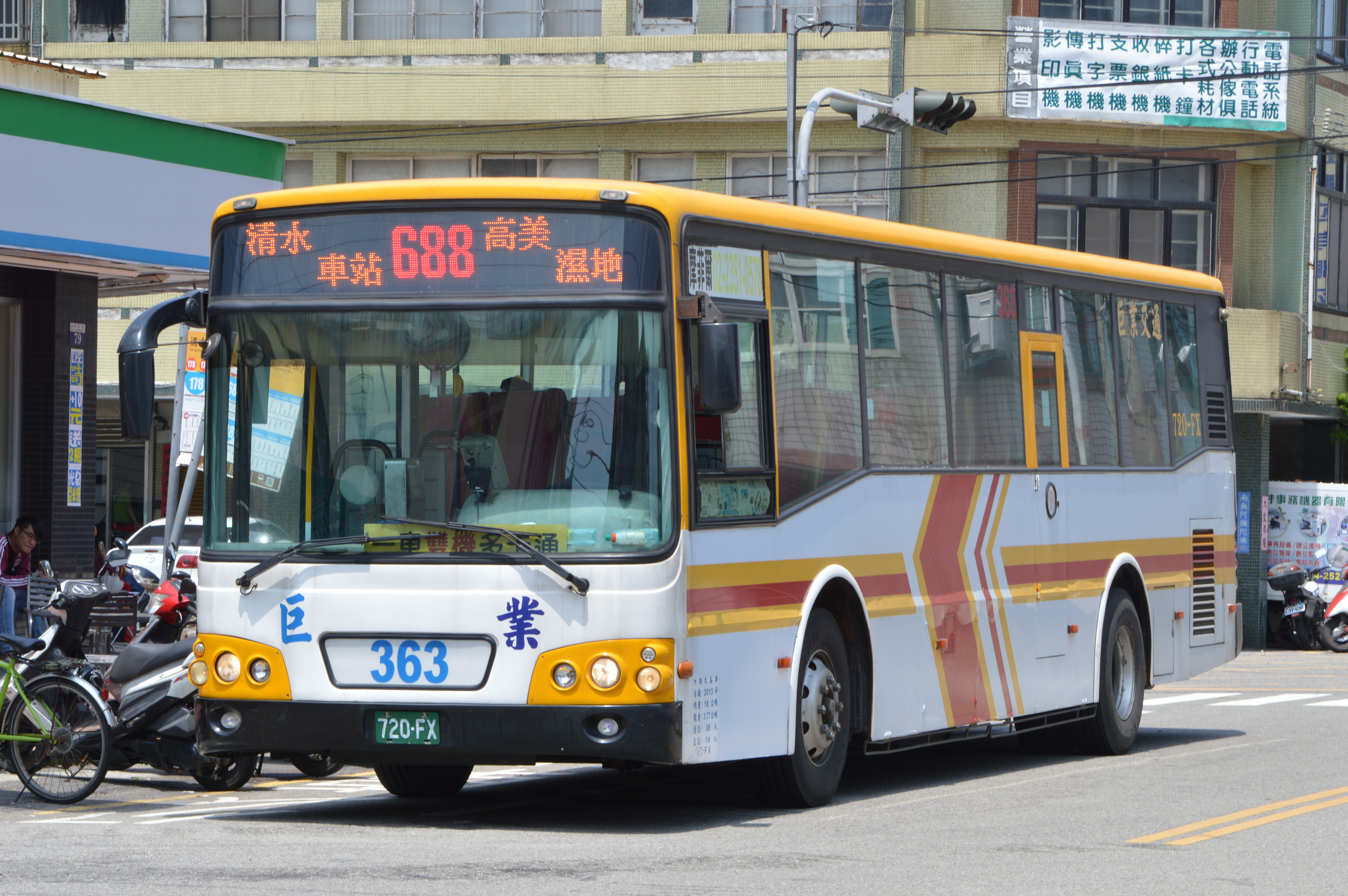 沙鹿市區巨業交通(720-FX)